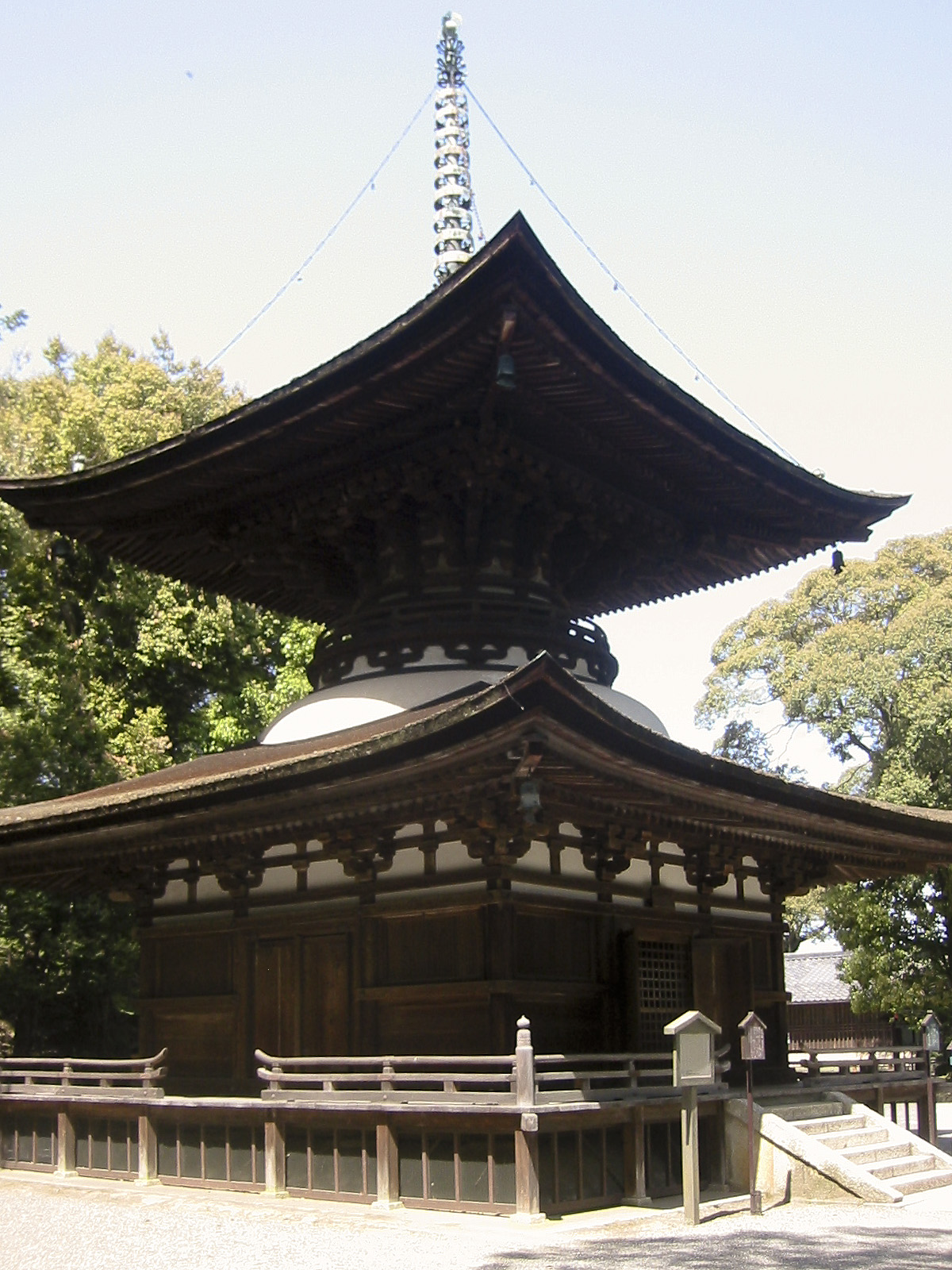 滋賀県 石光山石山寺